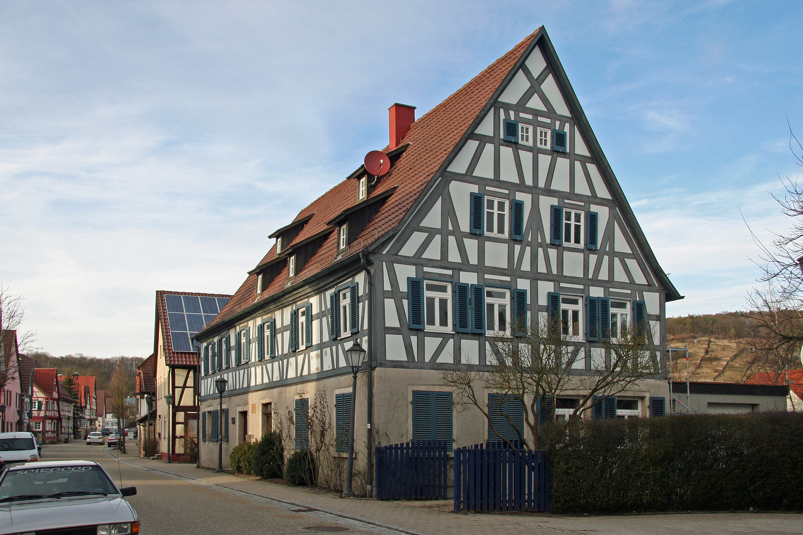 Ehemaliges Schulhaus in Ochsenbach aus dem Jahr 1793